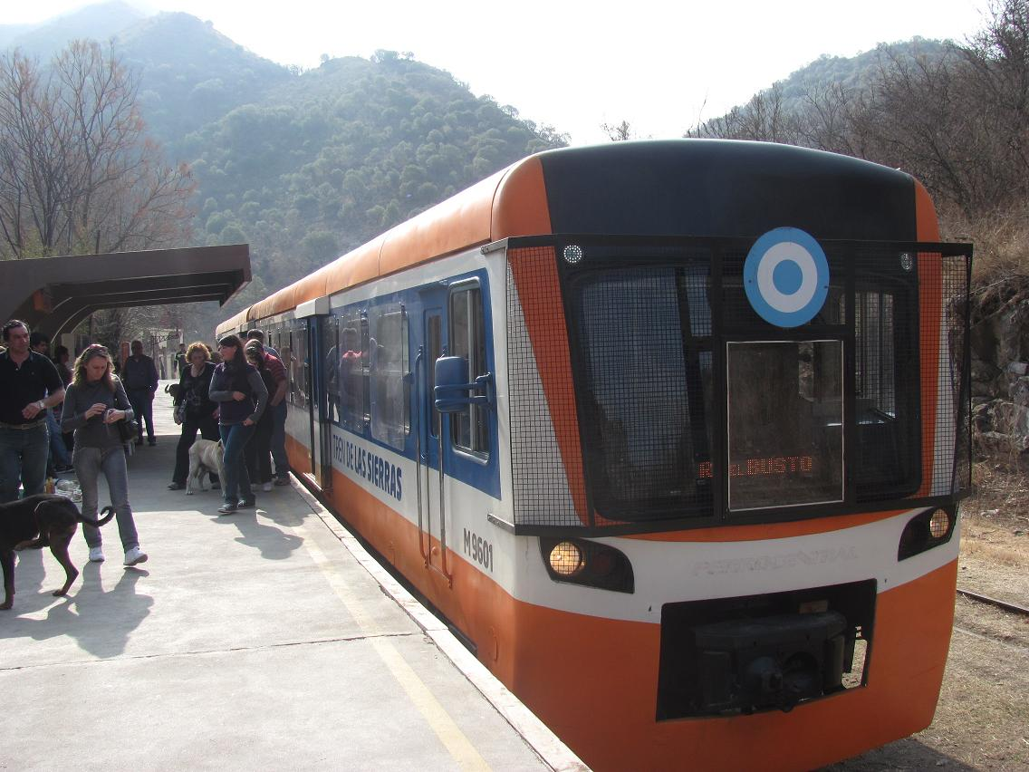 Estación Casa Bamba provincia de Córdoba, Argentina.